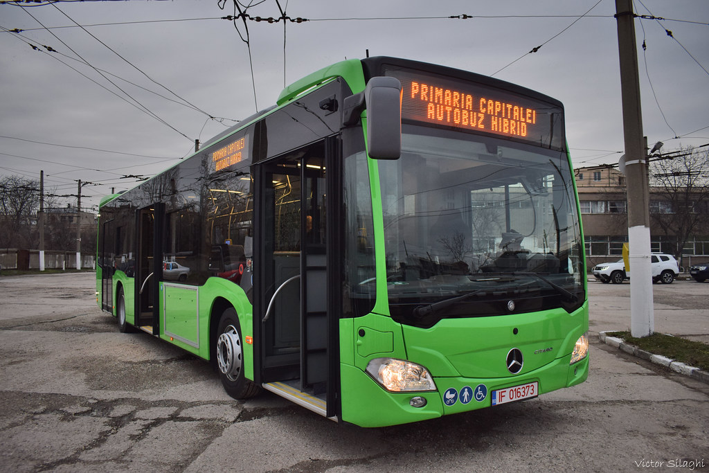 Primul Autobuz Hybrid din București